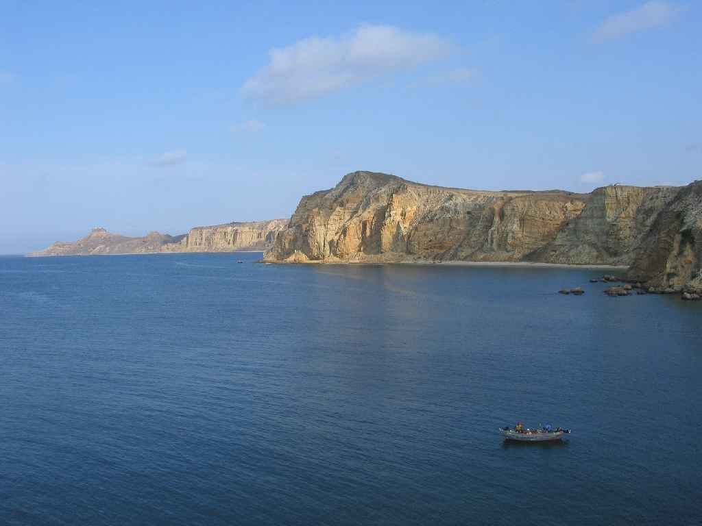 Vista das falésias para norte da Caotinha, Benguela, Angola.